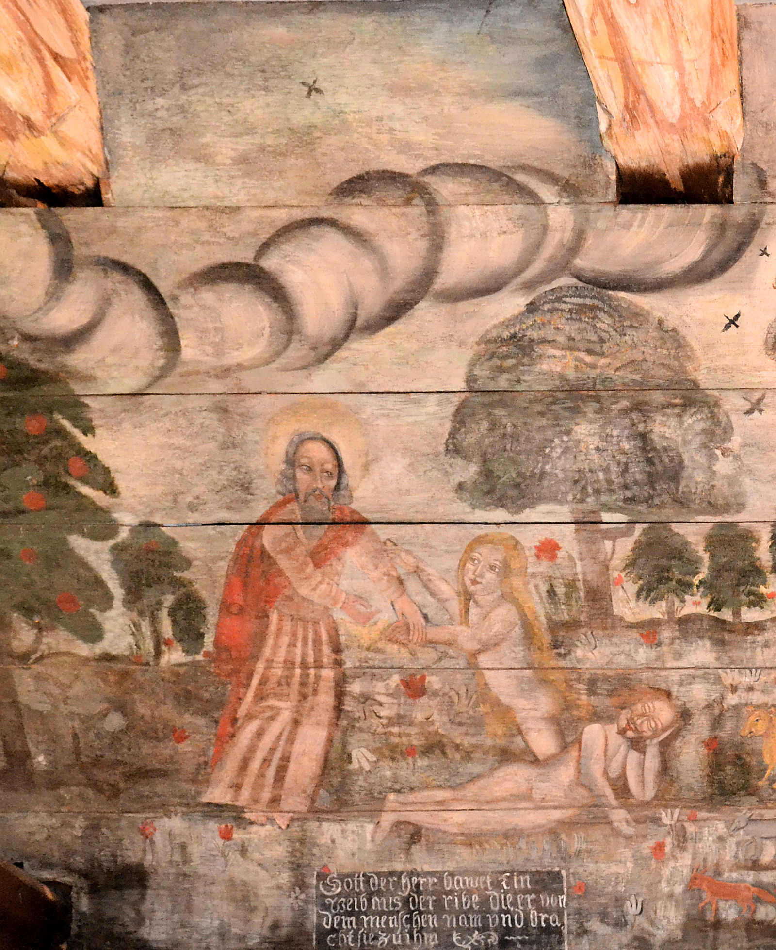 Kościół w Dzisnej (województwo zachodniopomorskie)